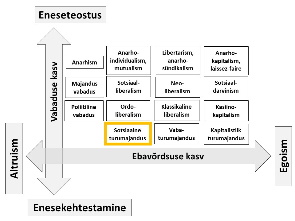 Turumajanduse mudel